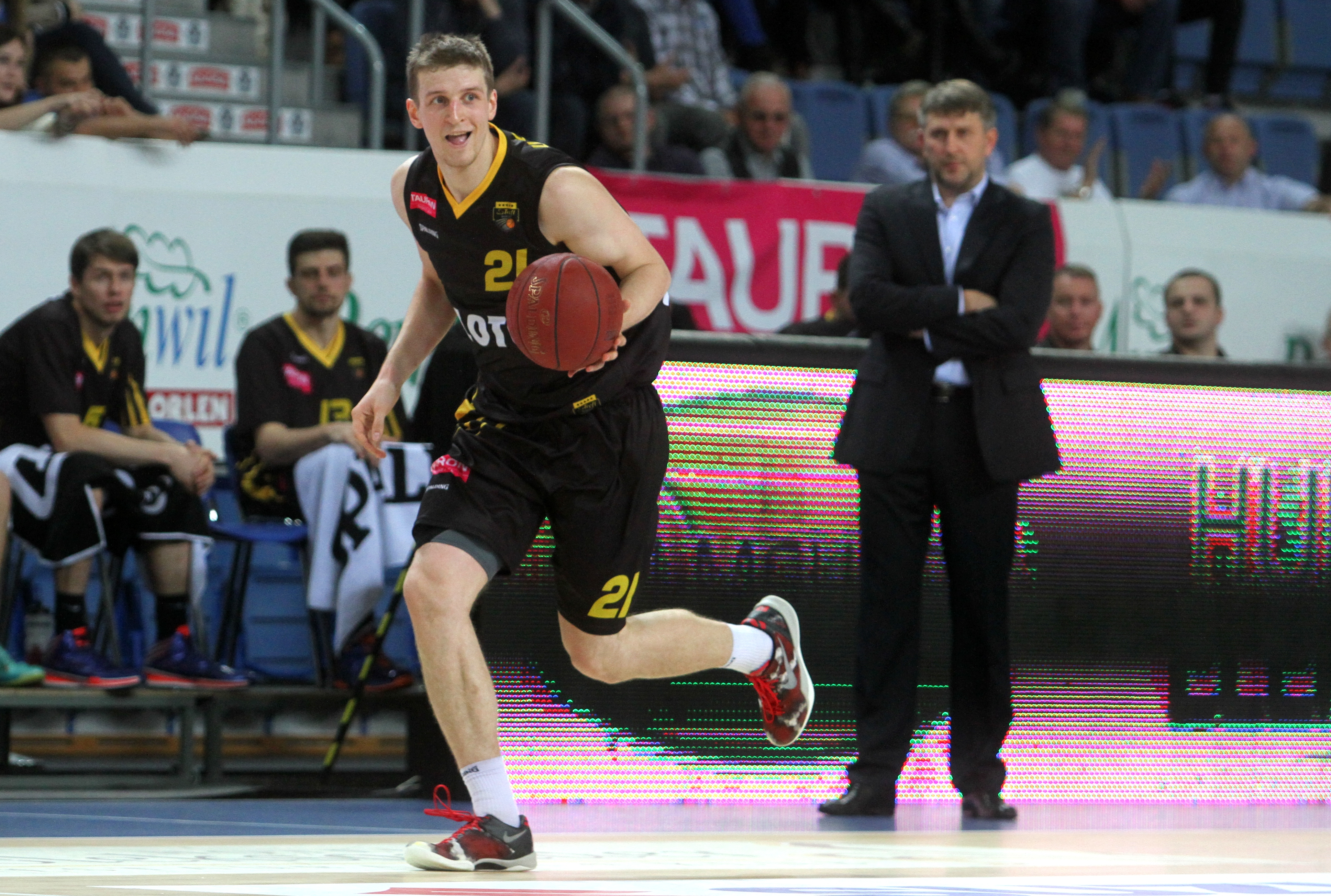 Adam Waczyński, Treﬂ Sopot